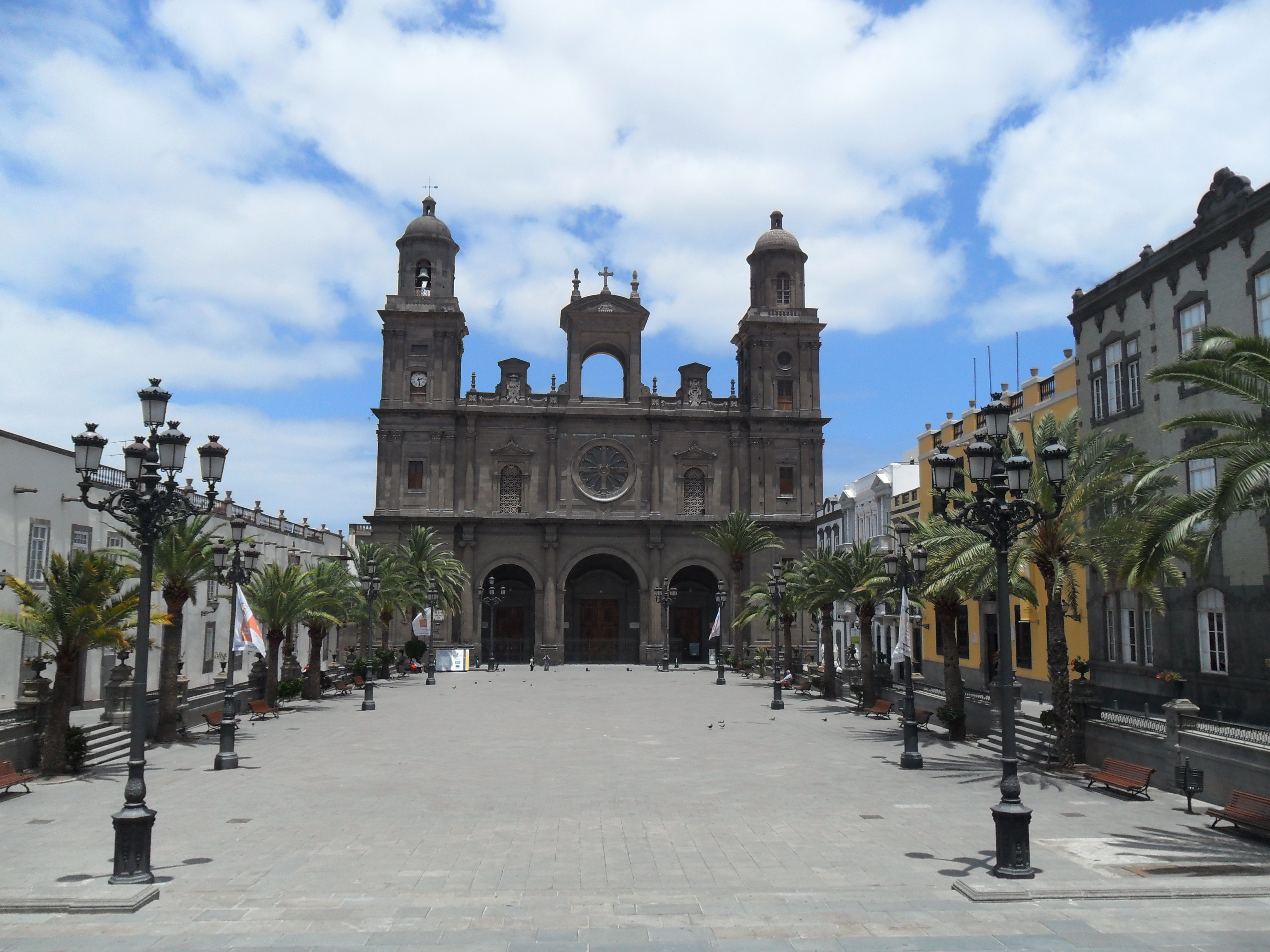 Catedral de santa ana